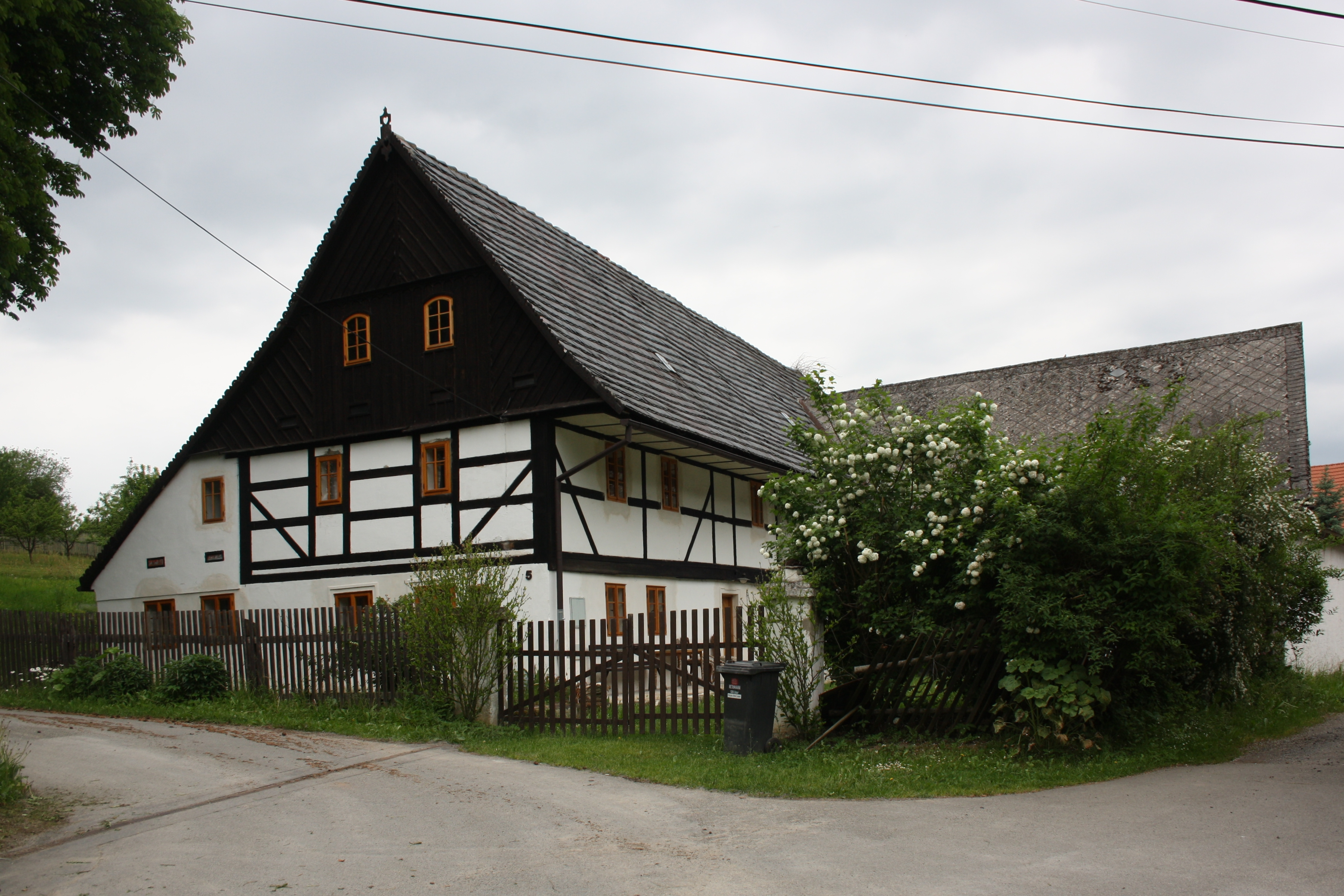 Lidové stavení ve vsi Obrok, místní části obce Tuhaň